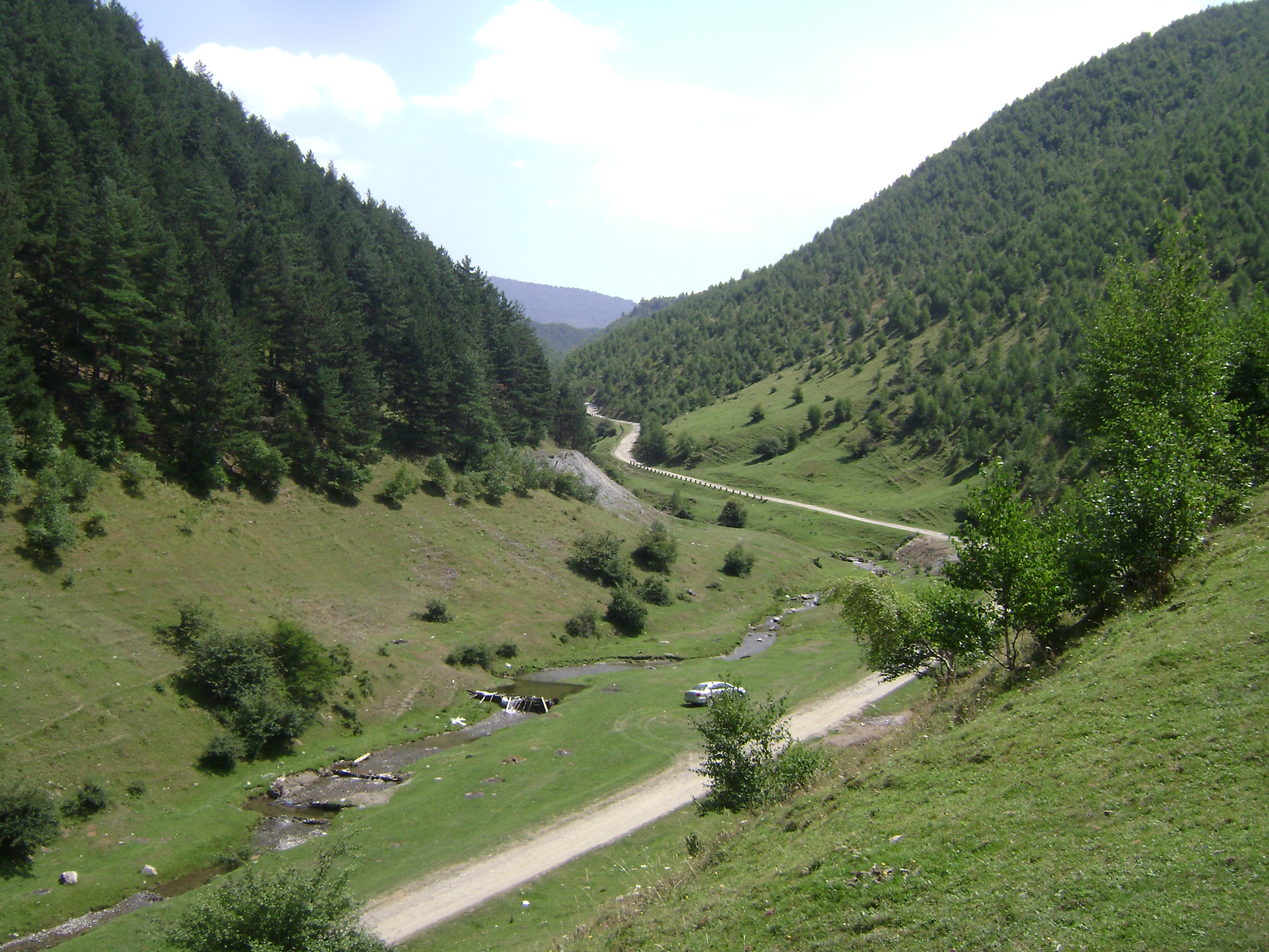 Sibeşel Valley, Răşinari, Romania